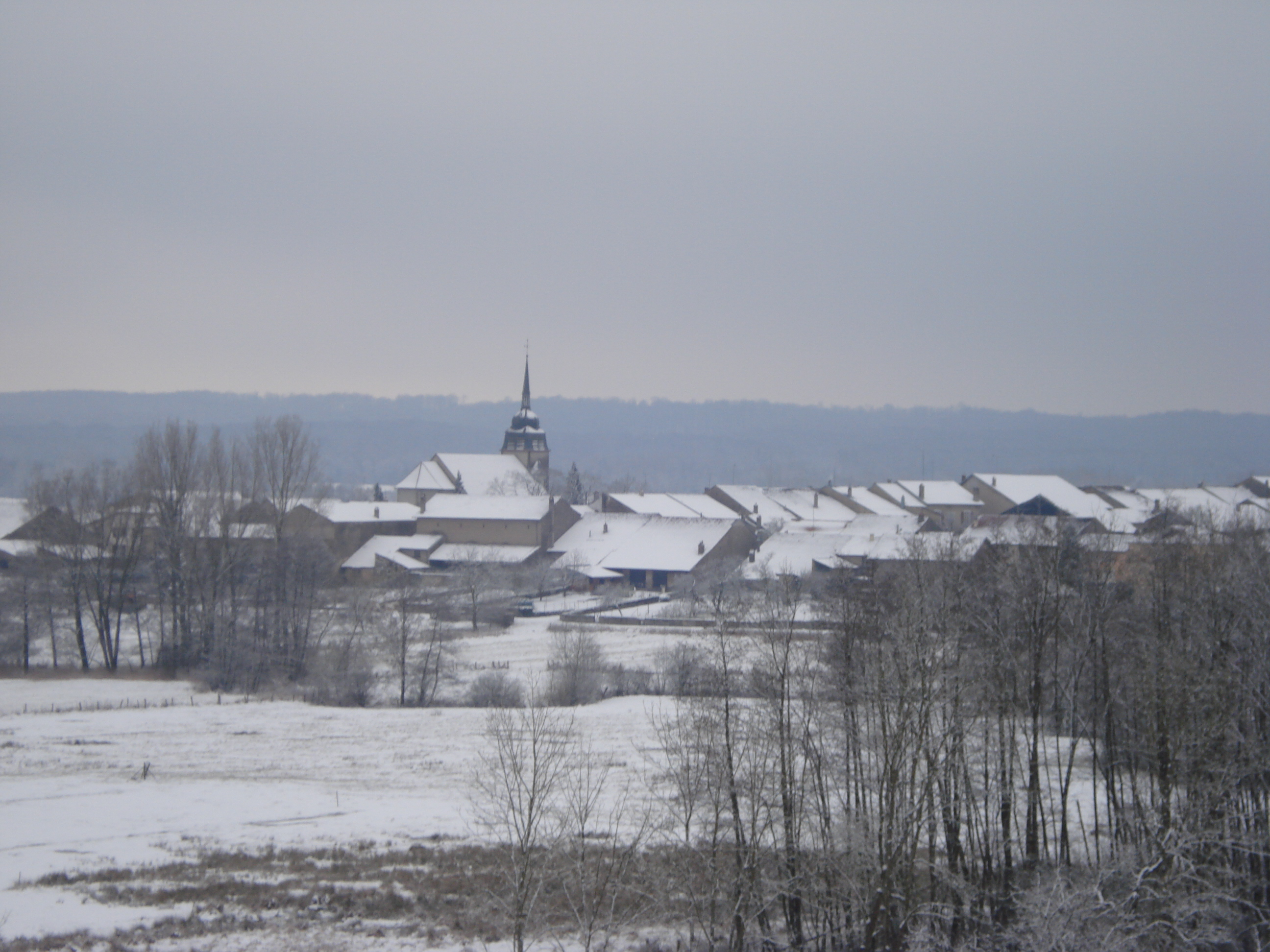 c'est le village de Domjevin sous la neige